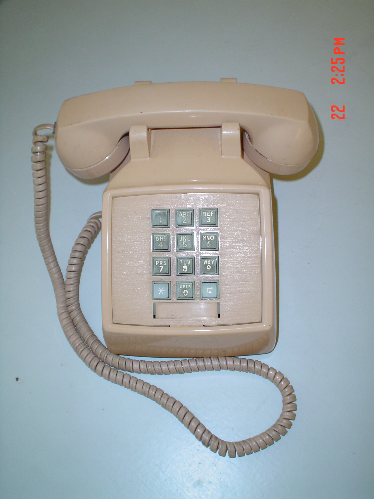 Közismert nyomógombos telefon az Egyesült Államokból (Telefónia múzeum, Budapest)